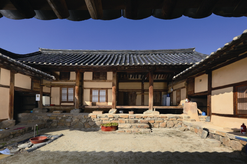 국가민속문화재 제176호 안동 수곡 고택 (安東 樹谷 古宅)